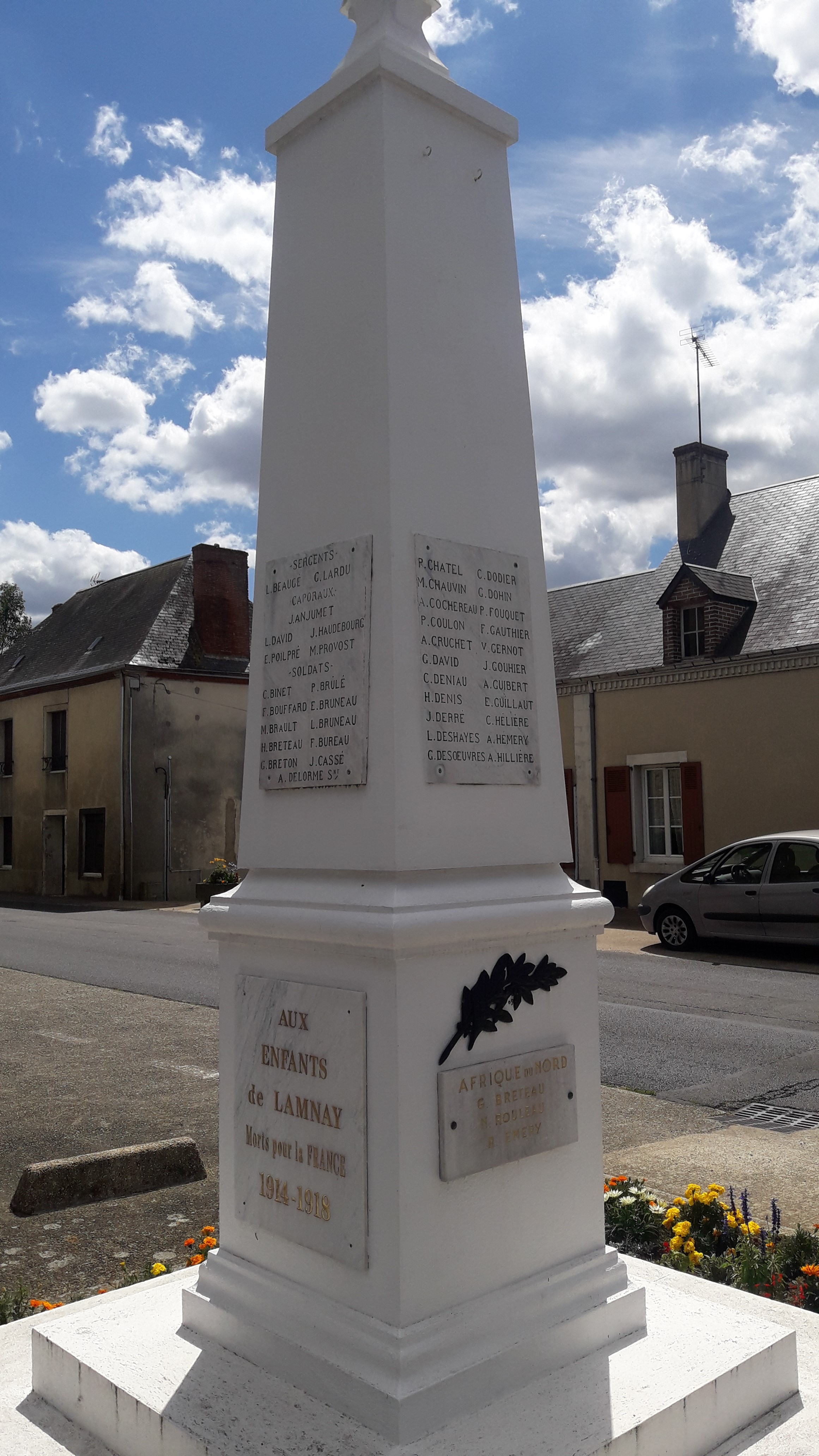 Monument aux morts - Commune de Lamnay - Sarthe - France